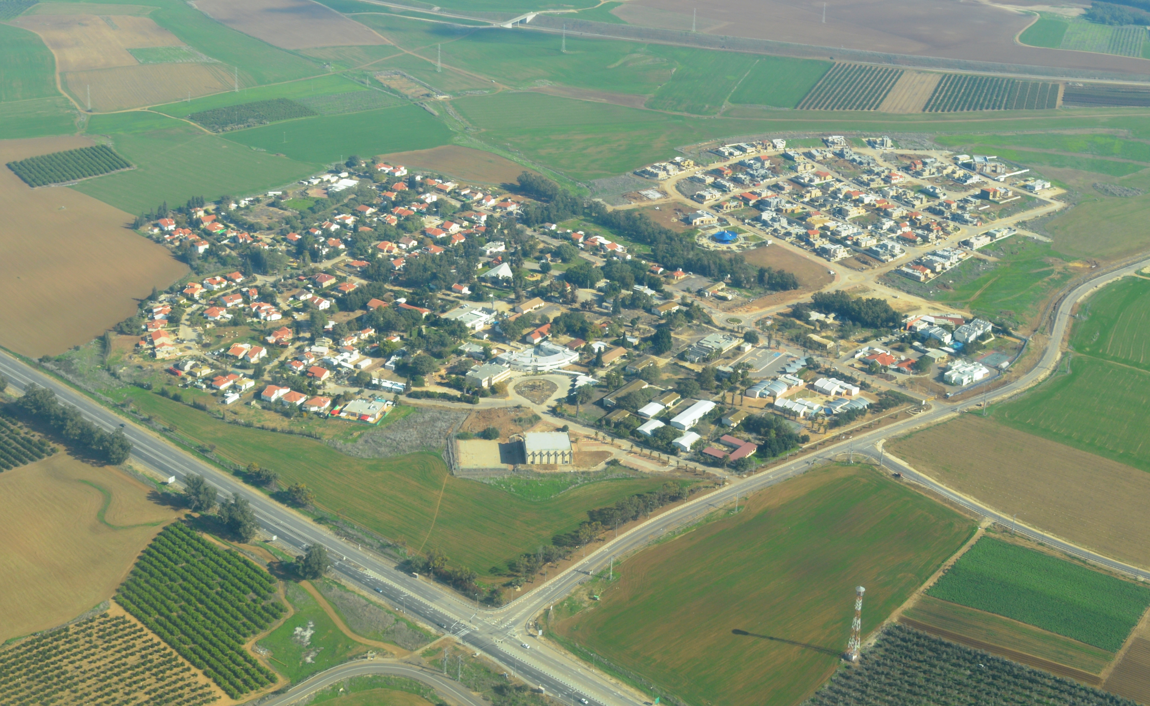 צילום אוויר - אבן שמואל